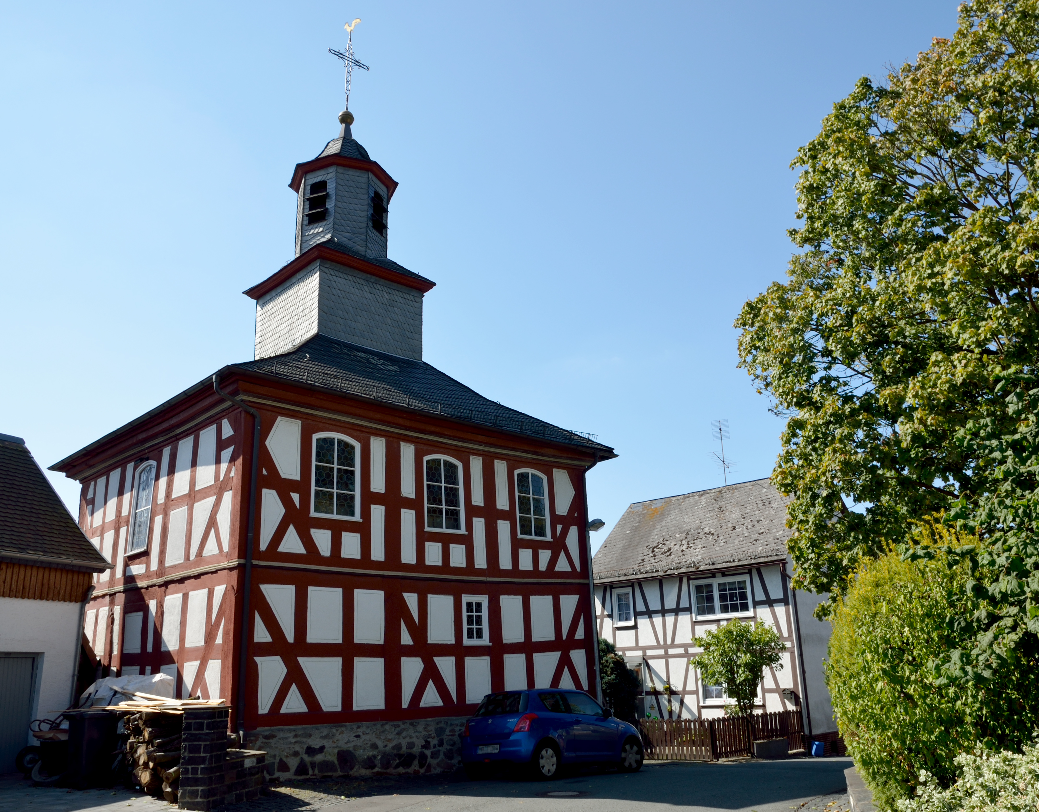 Die Evangelische Kirche in Runzhausen. Eine der drei "Kaffeemühlenkirchen" im Landkreis Marburg-Biedenkopf.